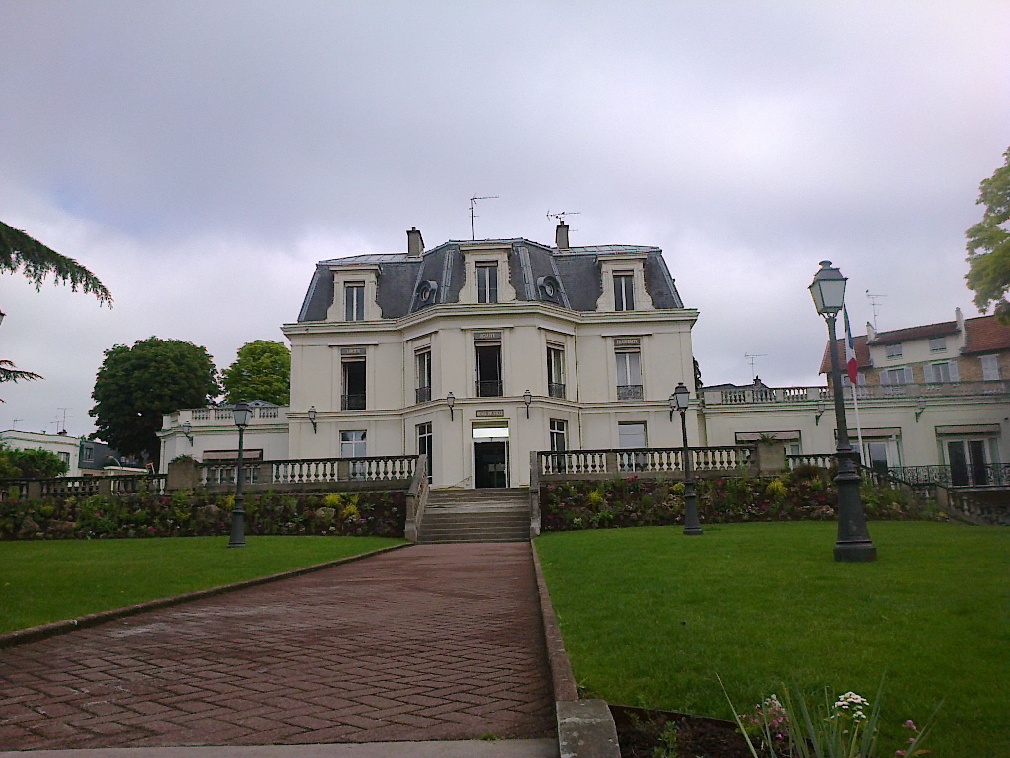 Mairie de Chaville (Hauts-de-Seine, France).